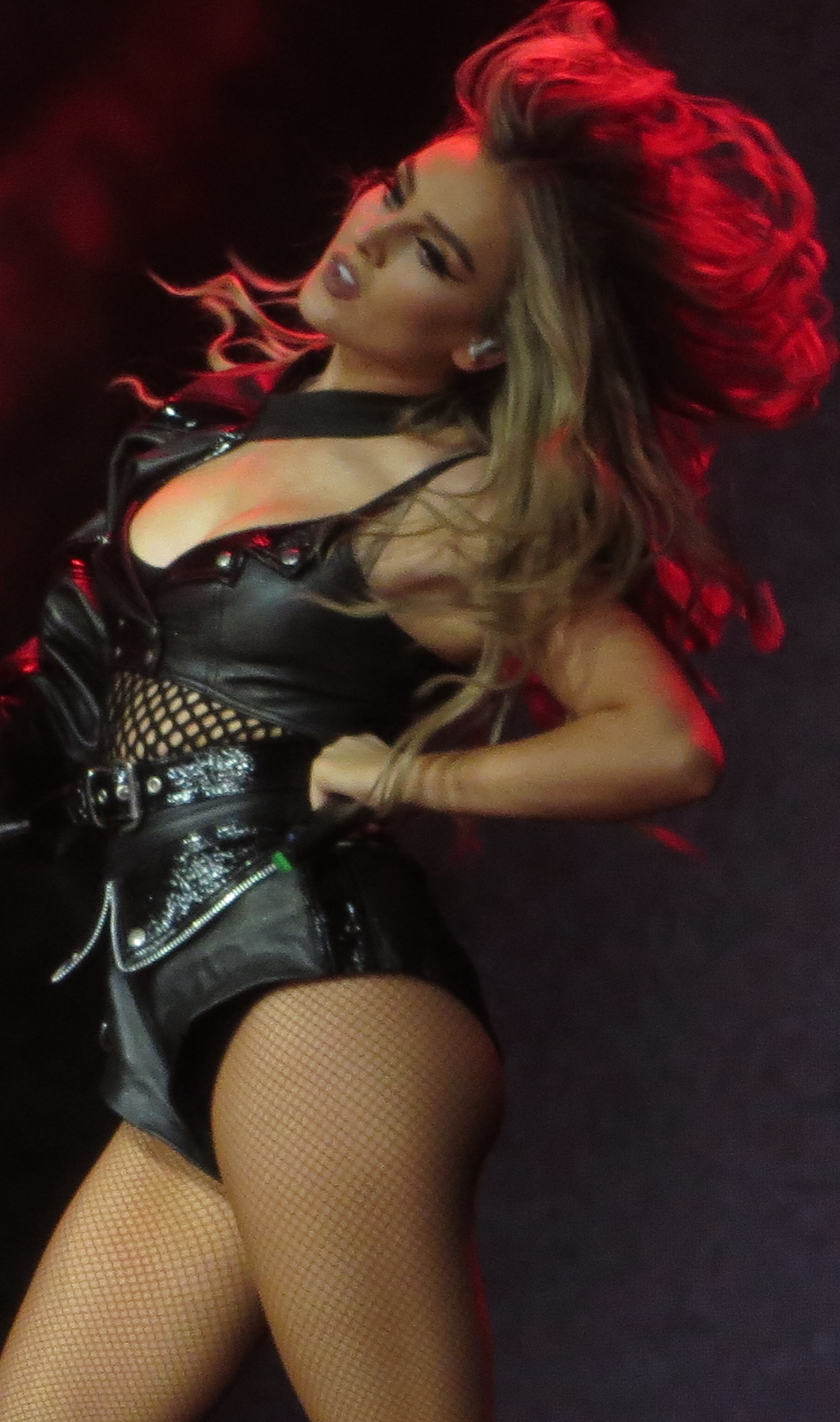 Little Mix 5